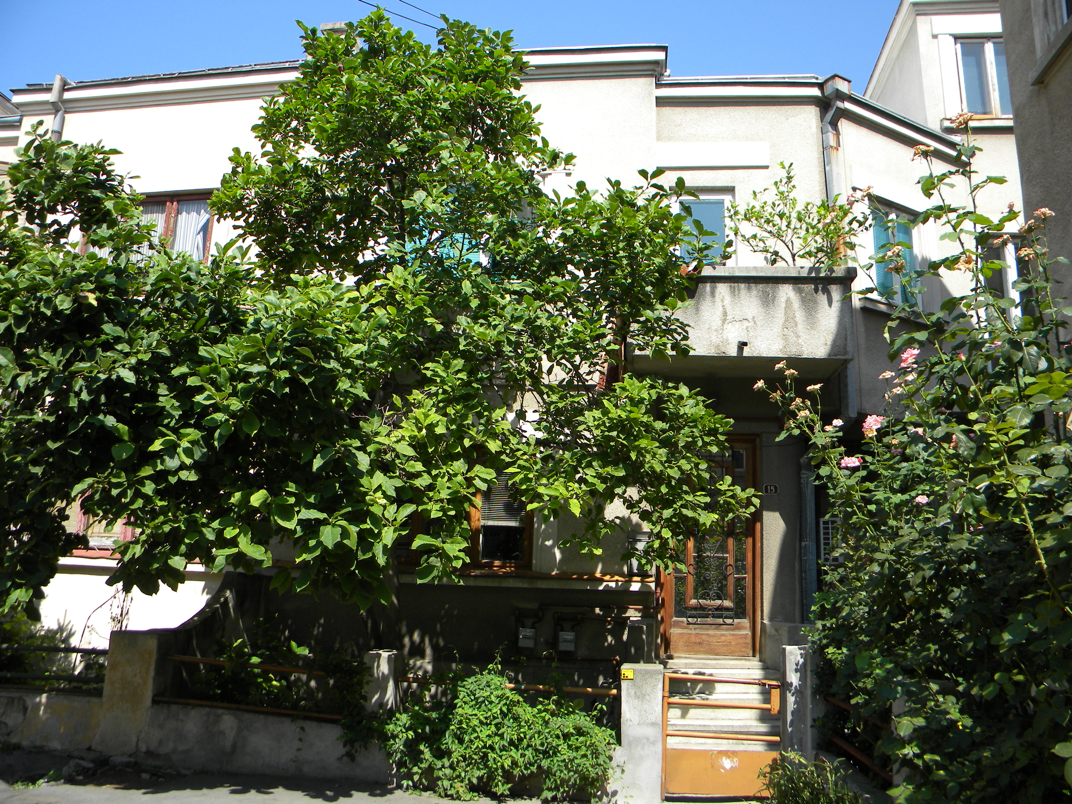 Bucuresti, Romania, Imobilul nr. 15 de pe Str. Naum Ramniceanu; B-II-m-B-19534